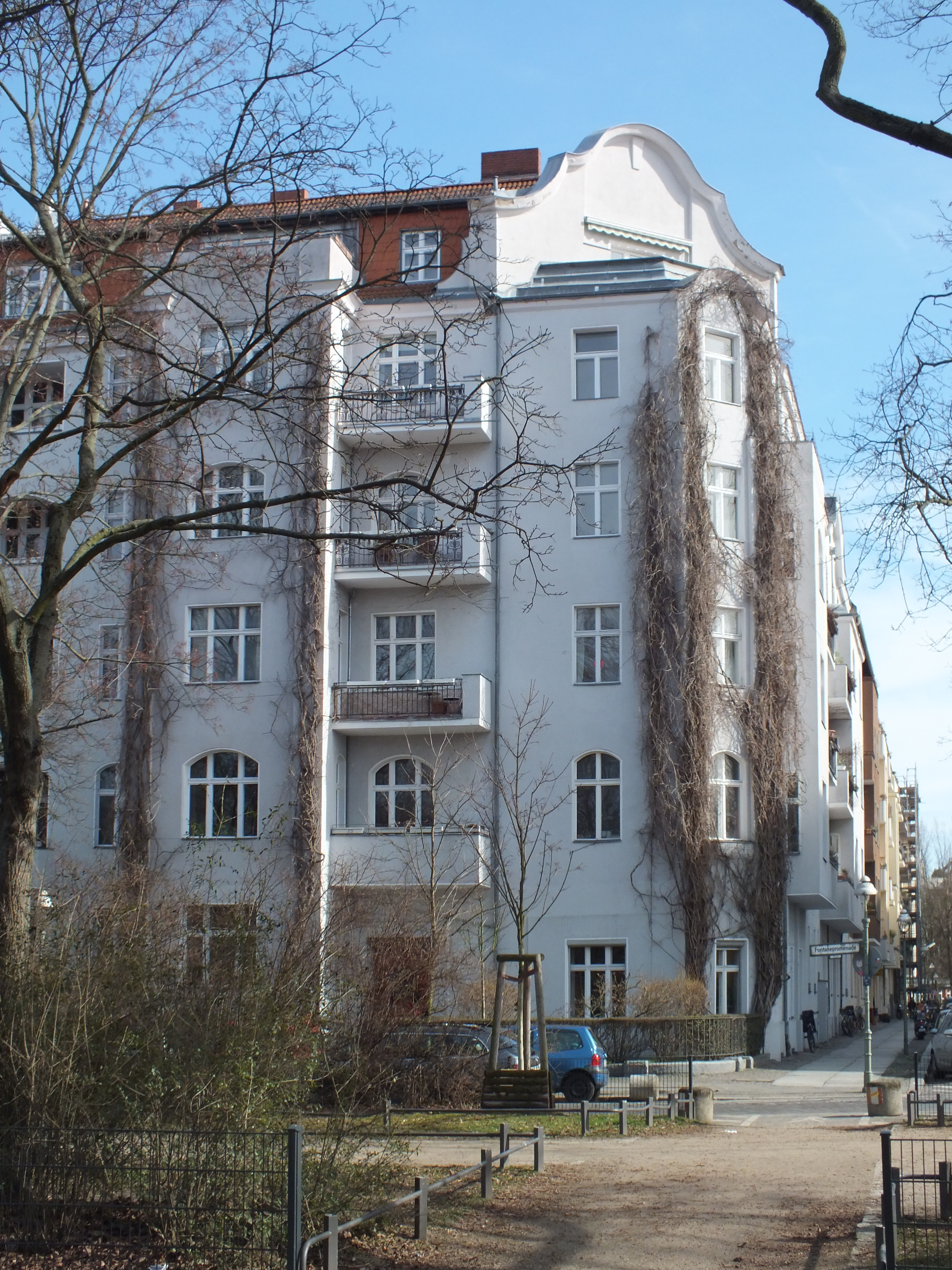 Fontanepromenade 11 Ecke Freiligrathstraße in Kreuzberg